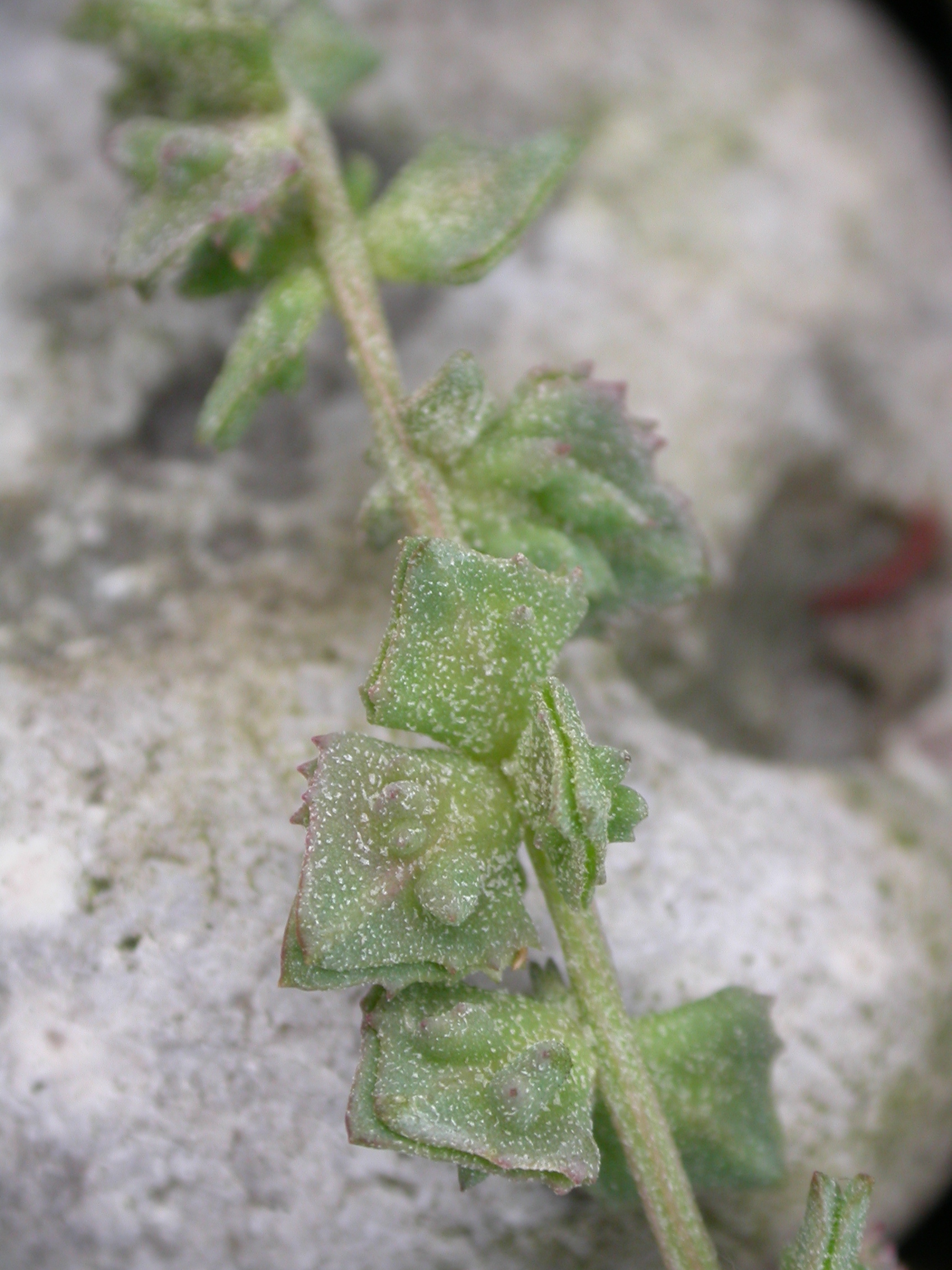 Atriplex glabriuscula Cayeux-sur-mer (Somme), France